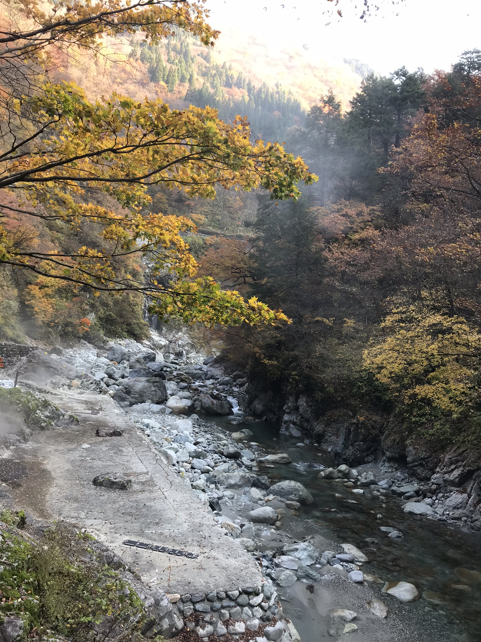 黒薙温泉旅館から